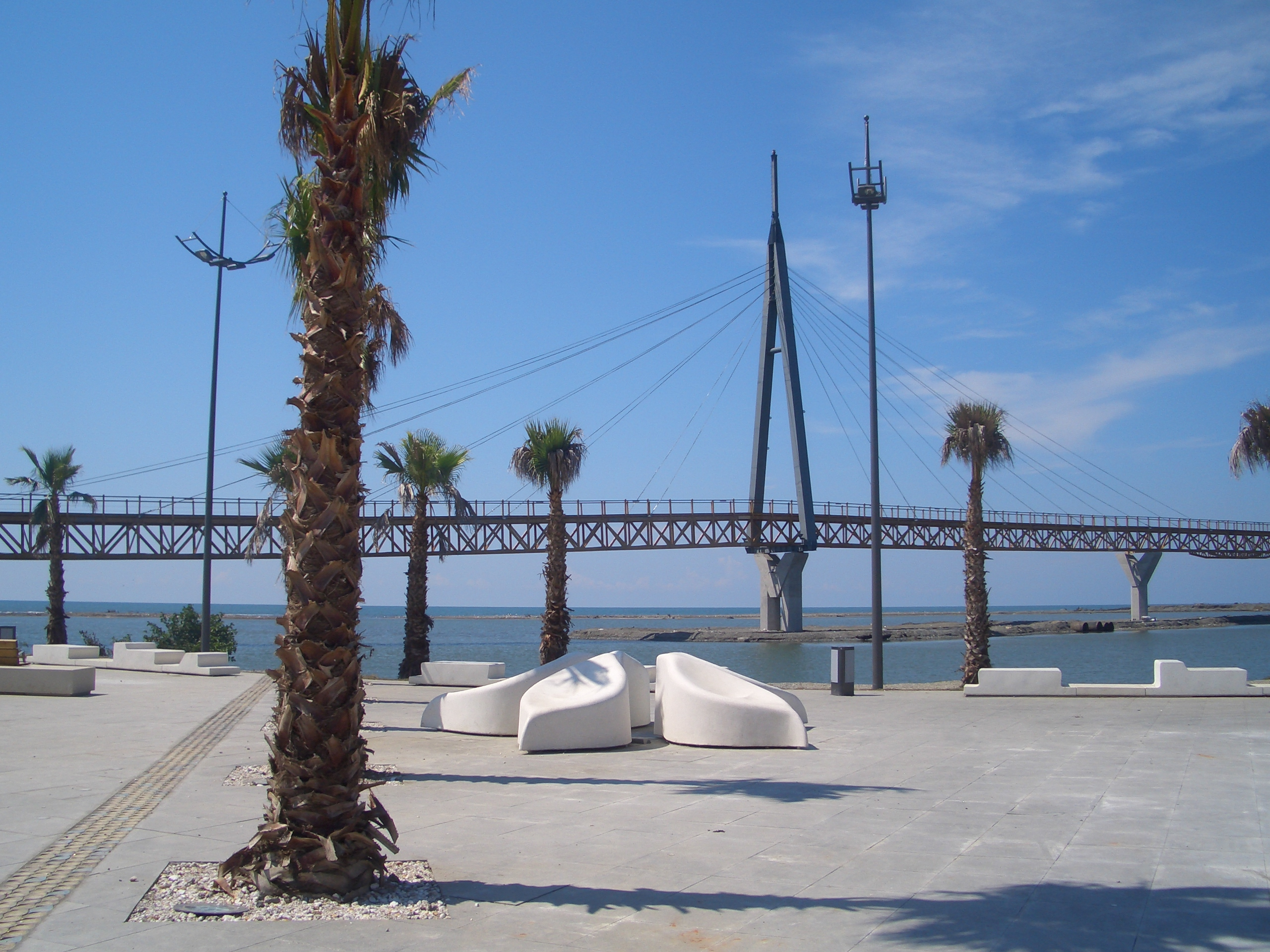 ანაკლიის სანაპირო